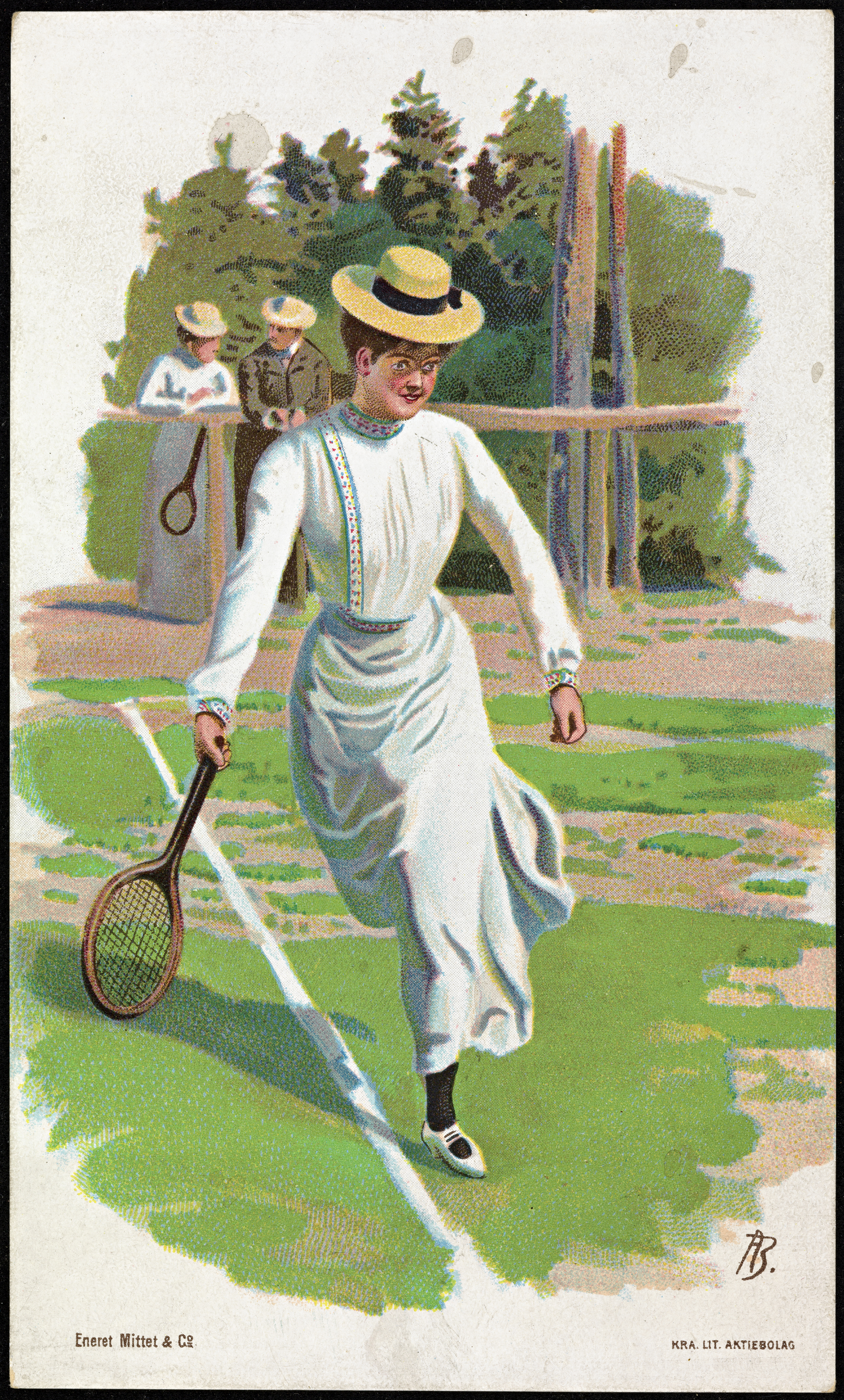 Kartongkort / postkort / overrekkelseskort